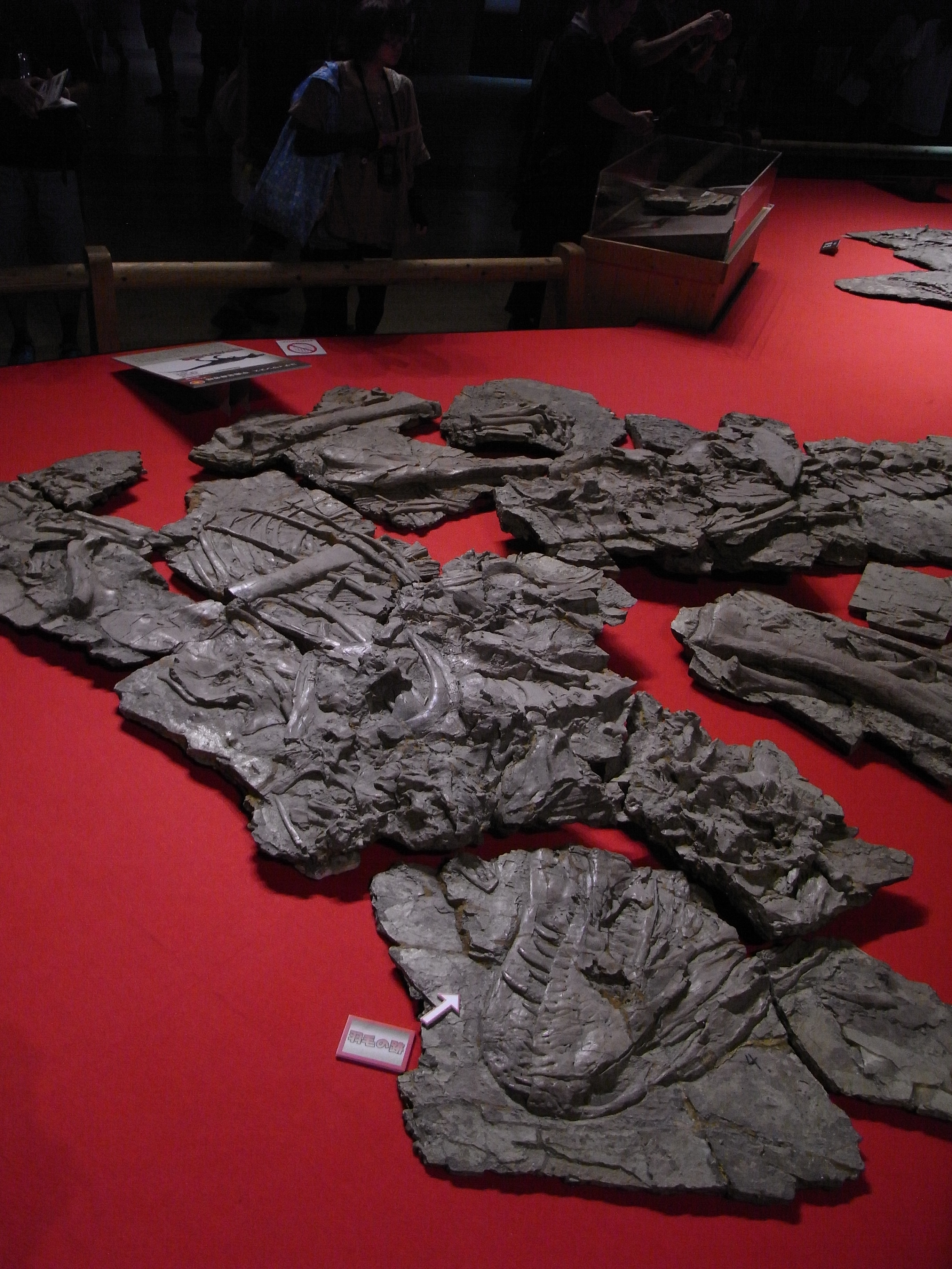 これすごい目玉商品なんですけど、人気が・・・・。